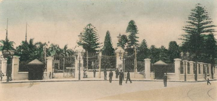 Tarjeta Postal enviada en 1903. Portón de entrada al Parque Lezama, en la esquina de las calles Defensa y Brasil, en Buenos Aires.